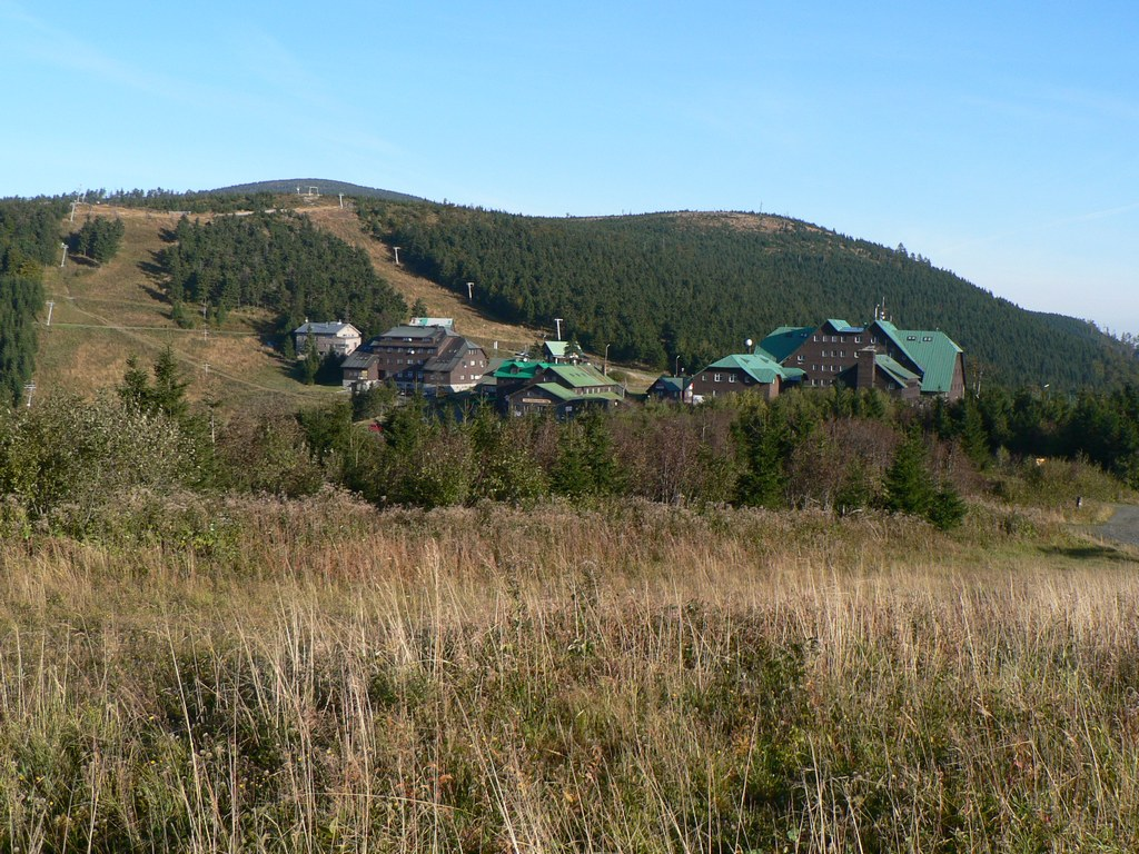 Pohled na Červenohorské sedlo od jihu.